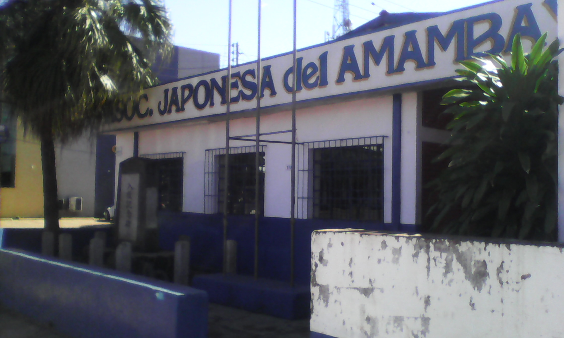 Sede de la Asociación Japonesa del Amambay en la ciudad de Pedro Juan Caballero, Paraguay.